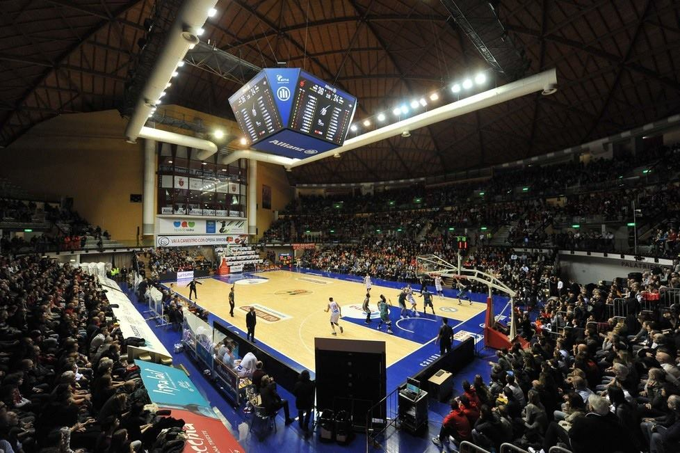 Allianz Wall, nuovo segnapunti con 4 megaschermi. Parquet NBA targato Allianz Palazzetto dello sport: PalaRubini Allianz Dome.